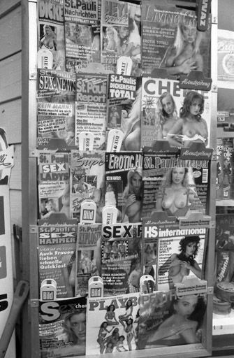 Massenmedien